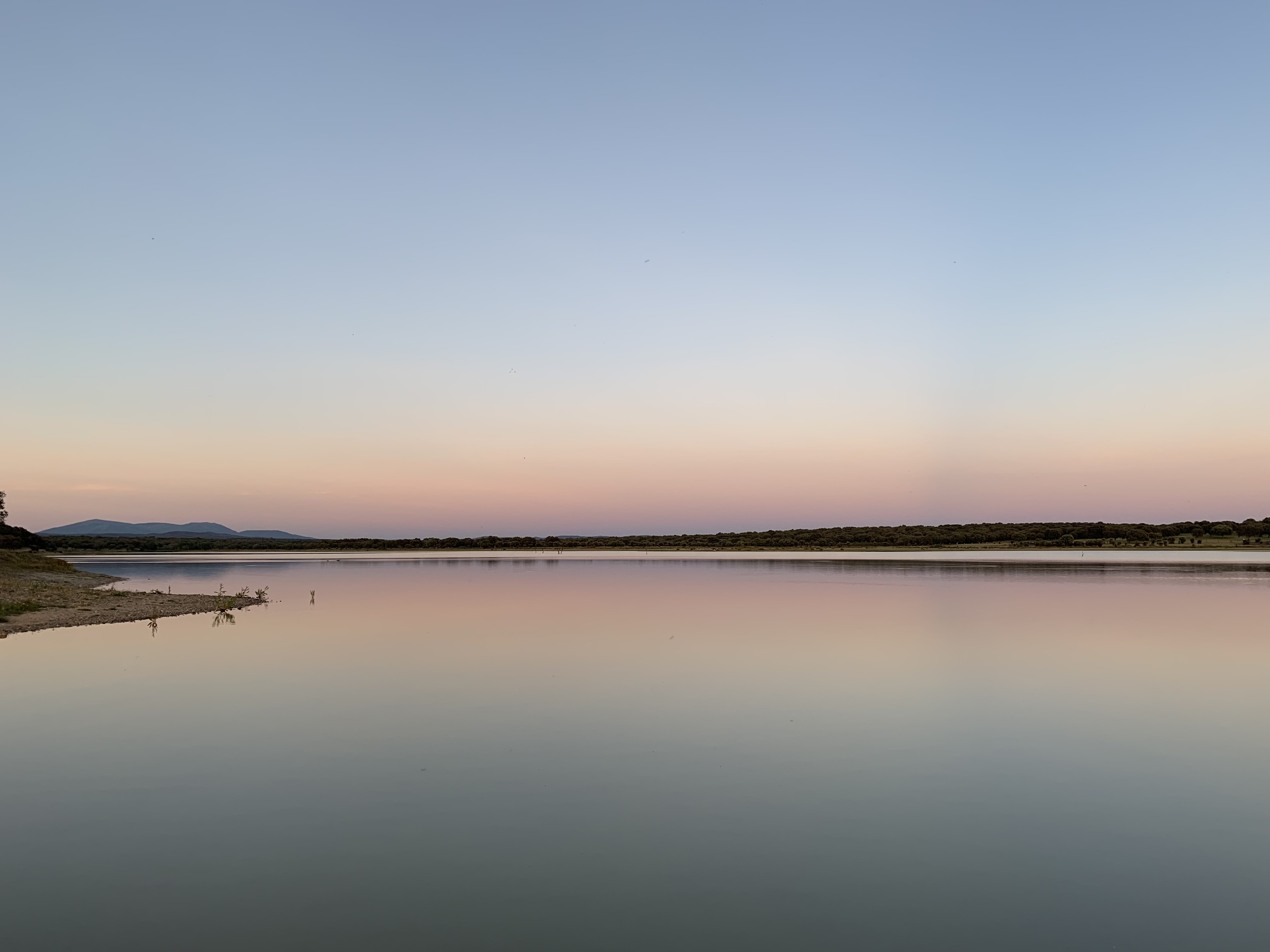 El embalse de Navalcán durante el atardecer. El cielo azul y rosado se refleja en el agua y alrededor hay vegetación.